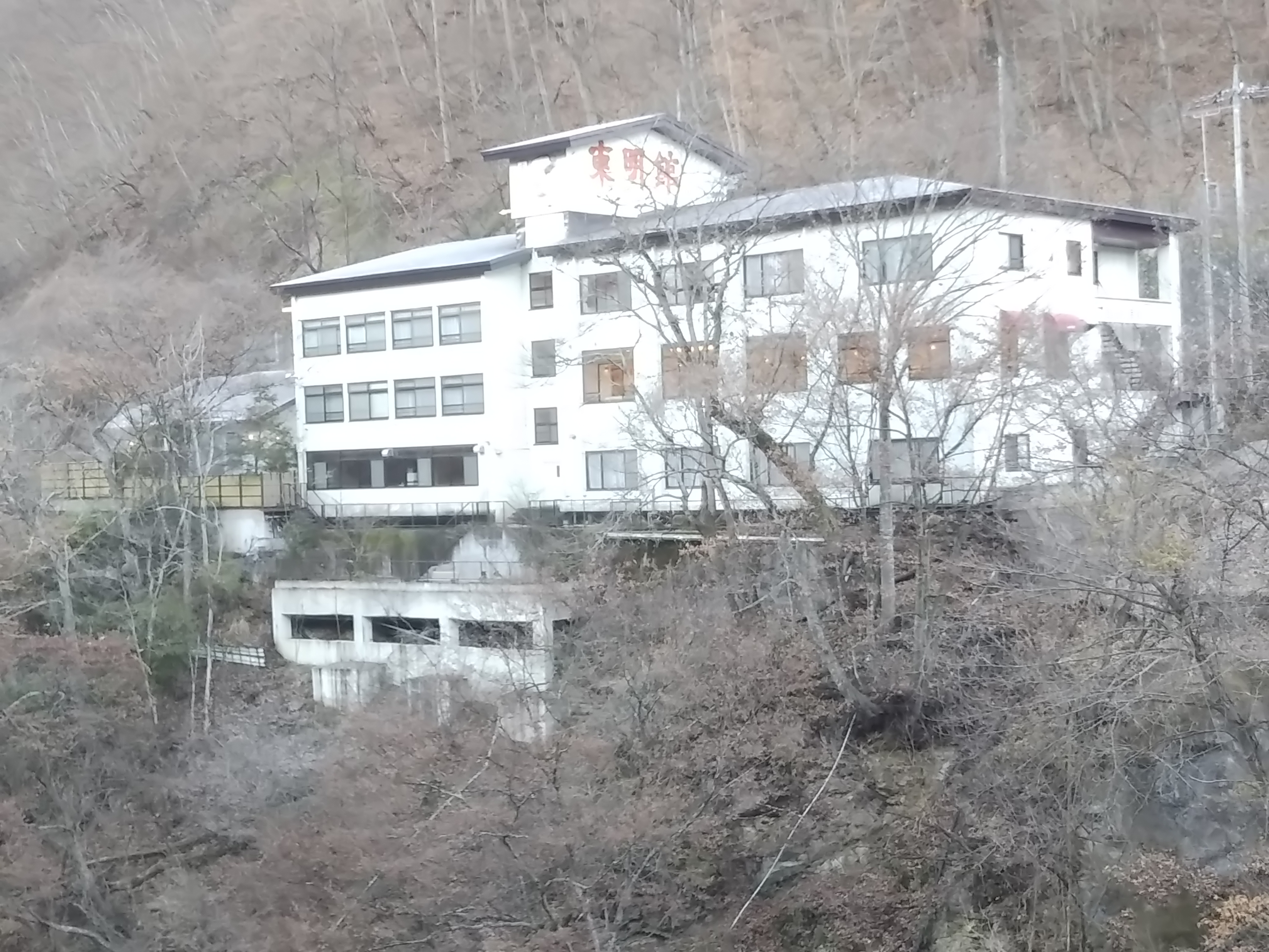 群馬県沼田市老神温泉、ぎょうざの満洲東明館